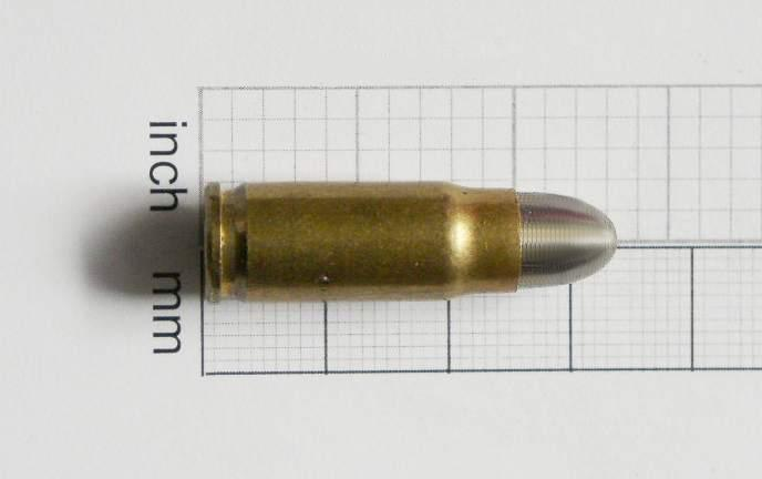 Patrone 7,63mm Mauser